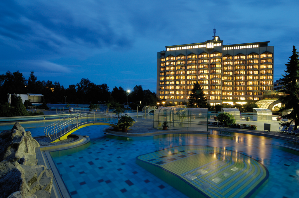 Johannesbad Nacht